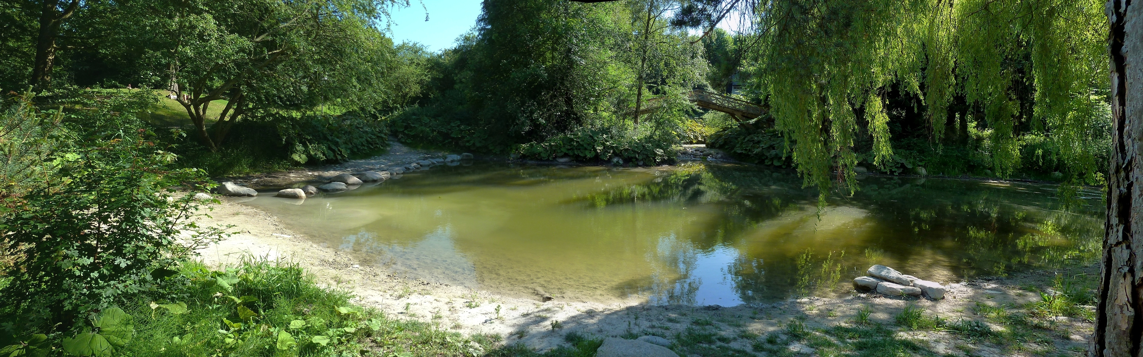 The lake and Norwegian Bridge in Søndermarken in Copenhagen, Denmark